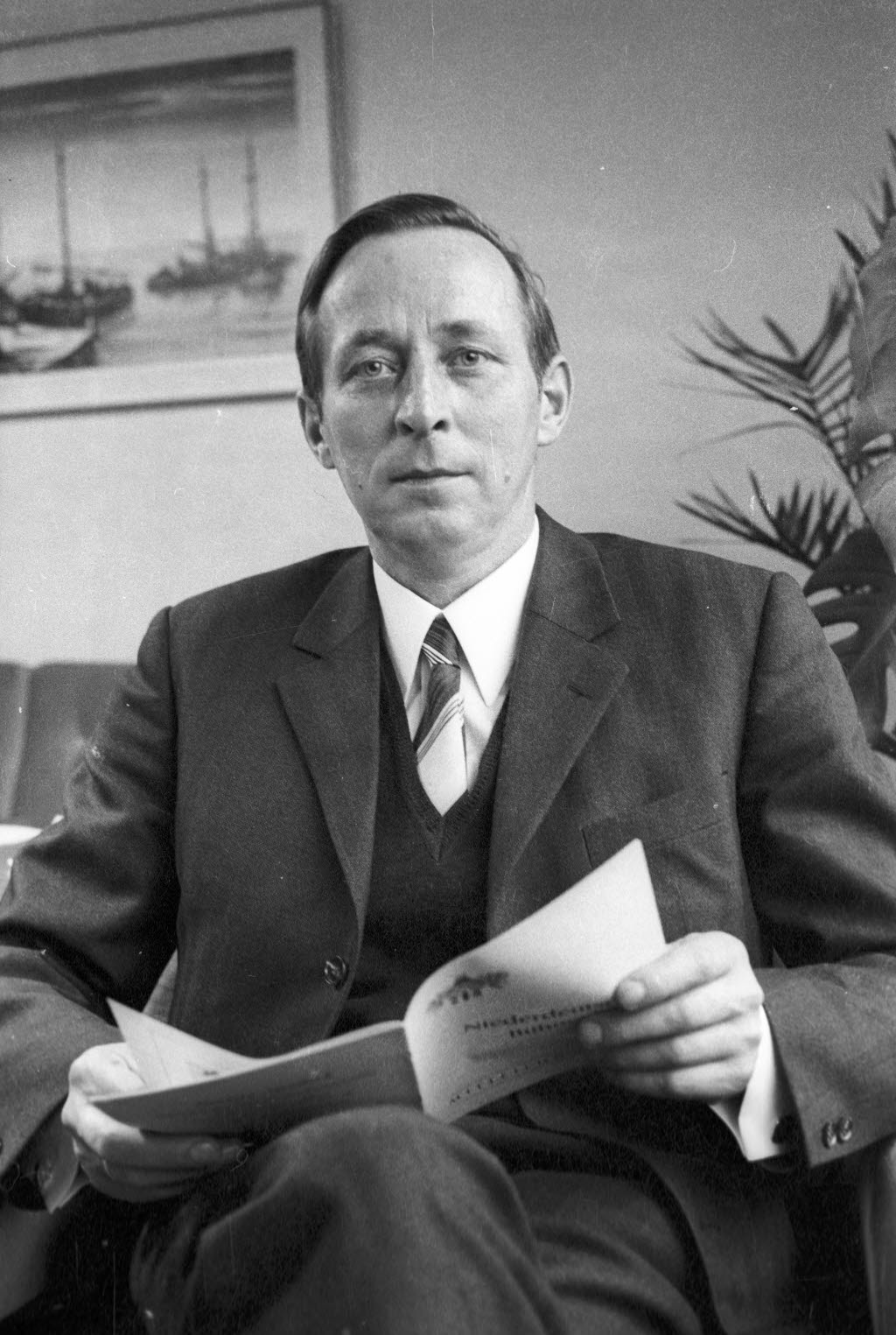 Plattdeutscher Autor und Oberstudienrat an der Gelehrtenschule.